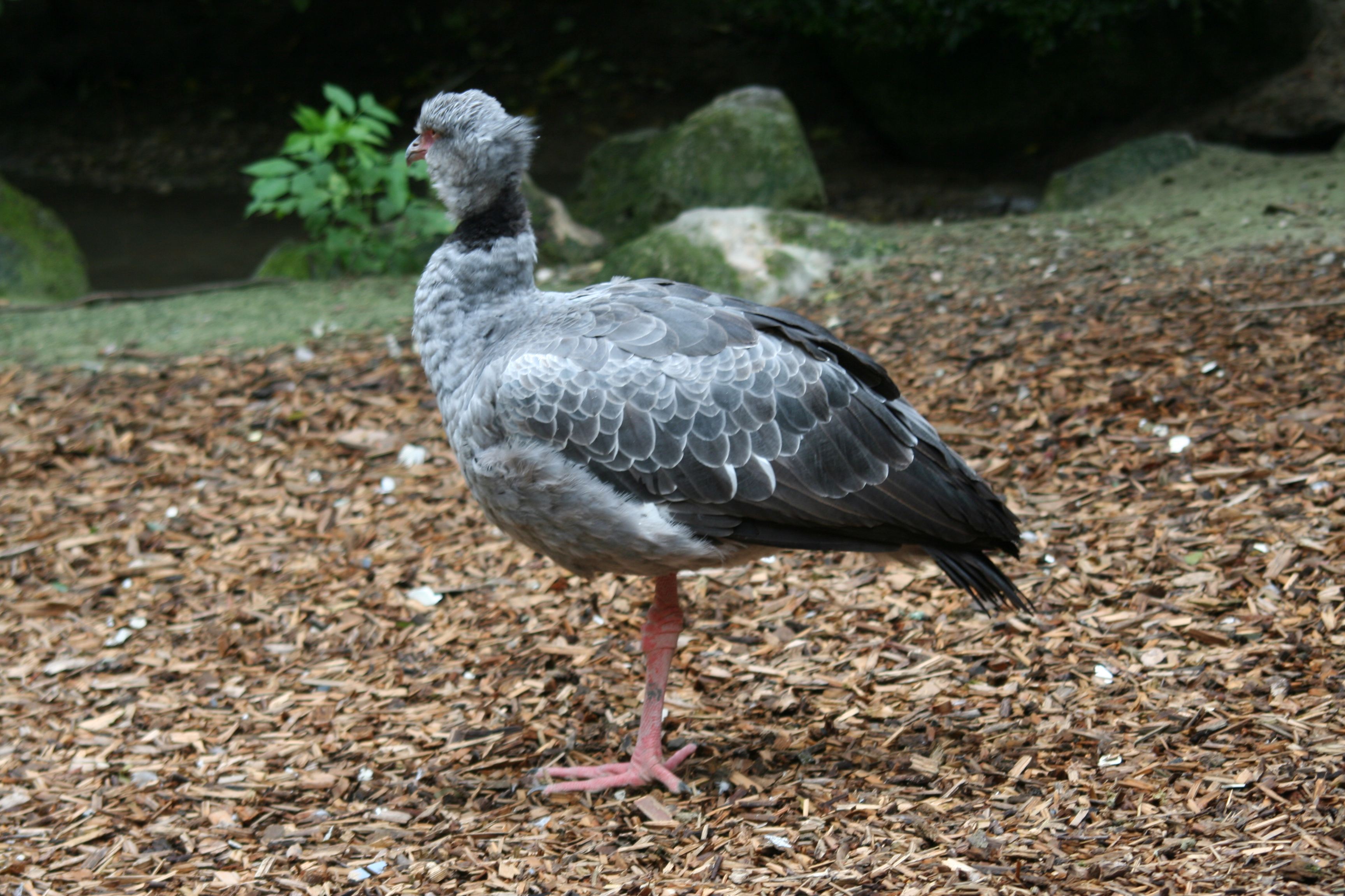 Chauna torquata